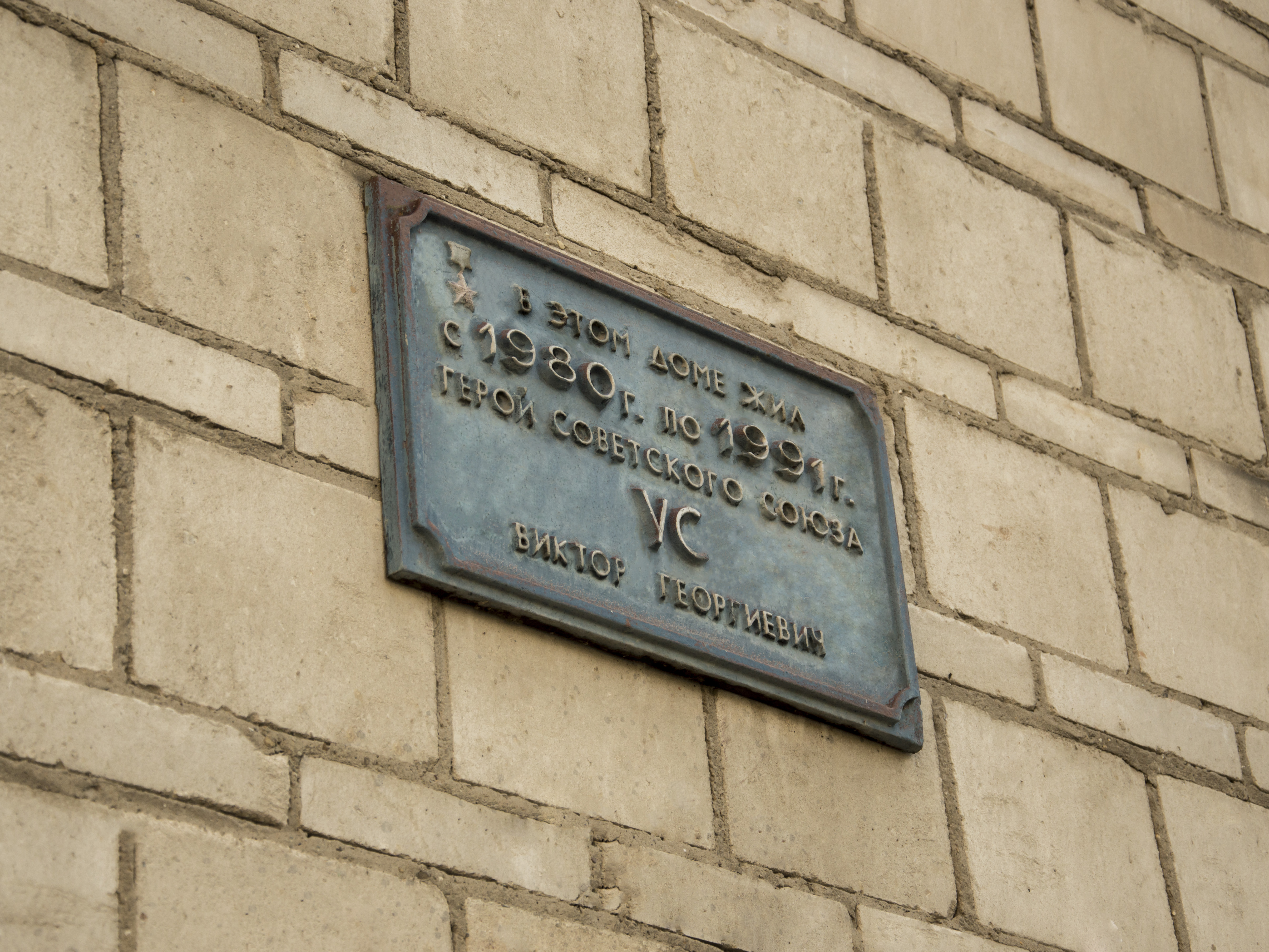 Табличка на доме, в которым жил Герой Советского Союза Виктор Ус.